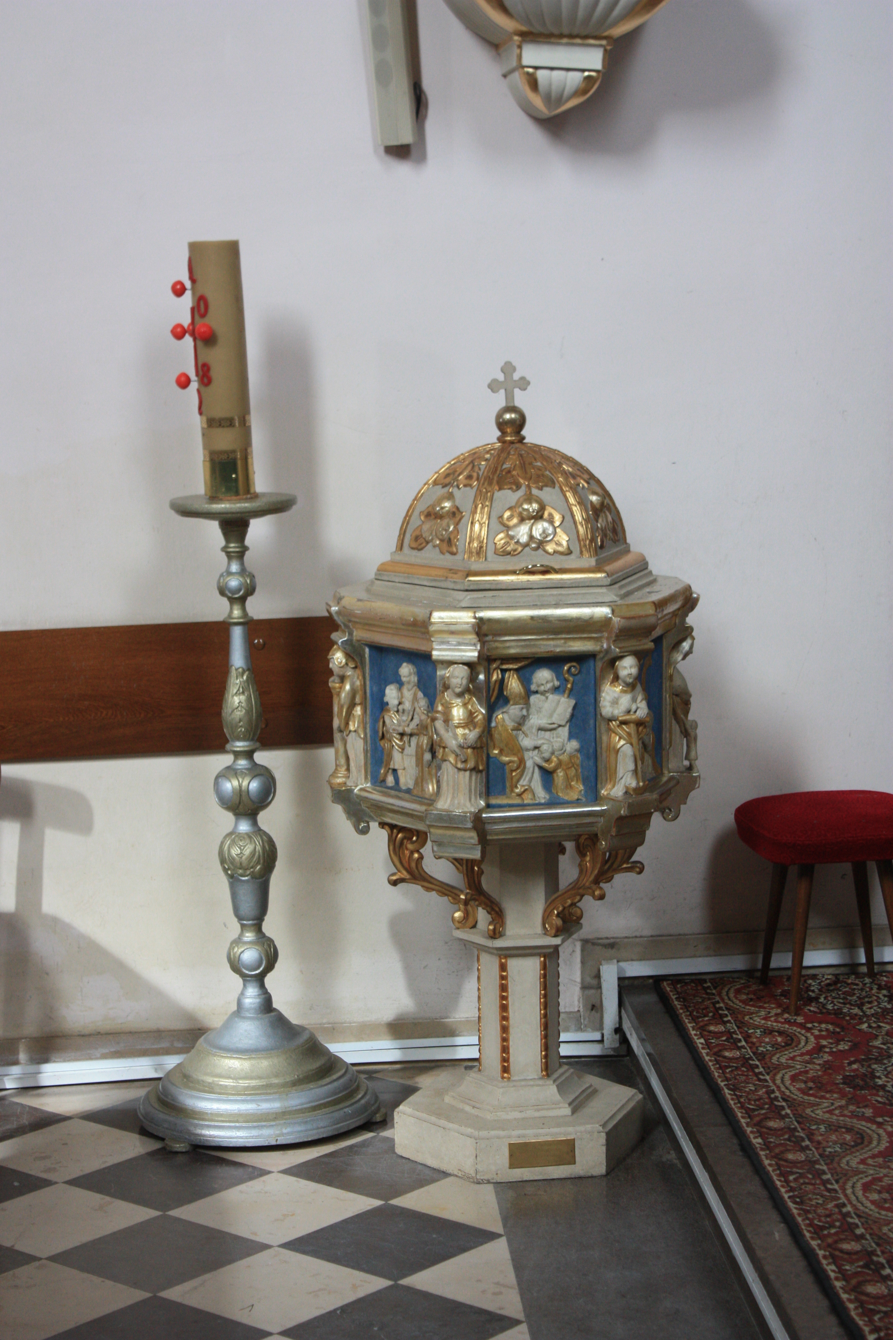 Kościół Narodzenia NMP w Kaźmierzu. Chrzcielnica.